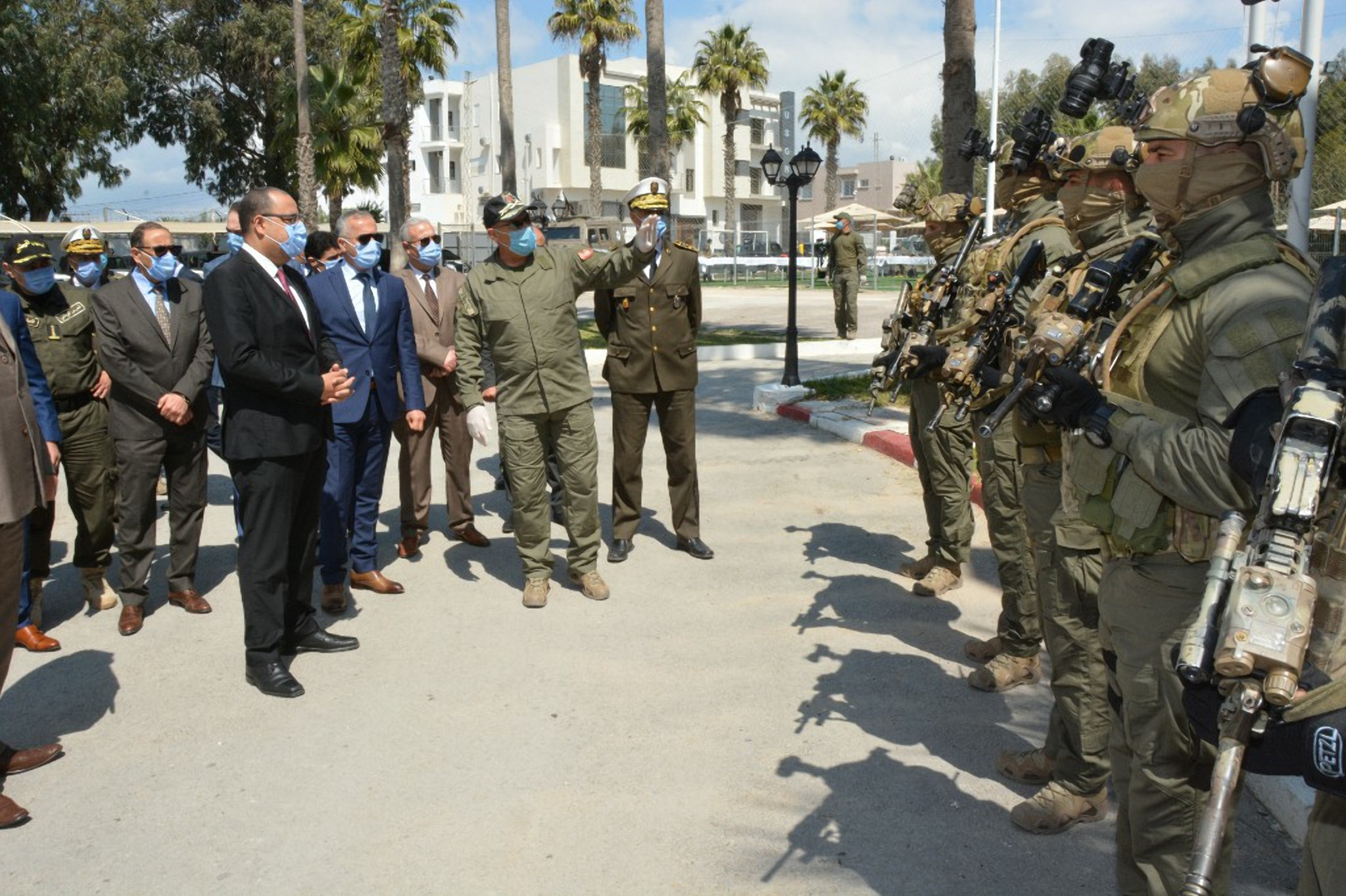 Le ministre de l'intérieur tunisien rend visite aux quartiers de l'unités spéciale de la garde nationale à Bir Bouregba le 9 avril 2020.